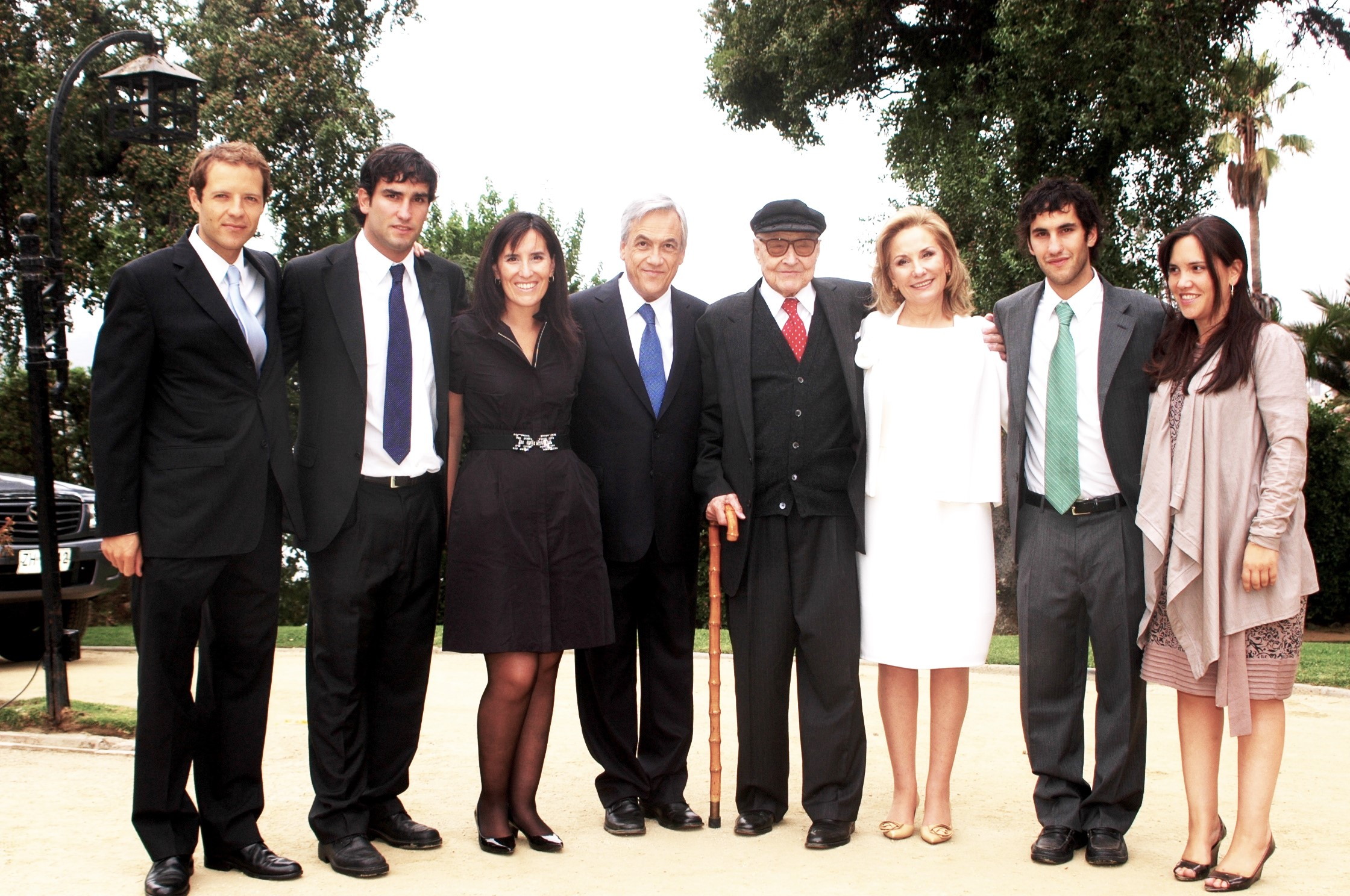 Año 2010